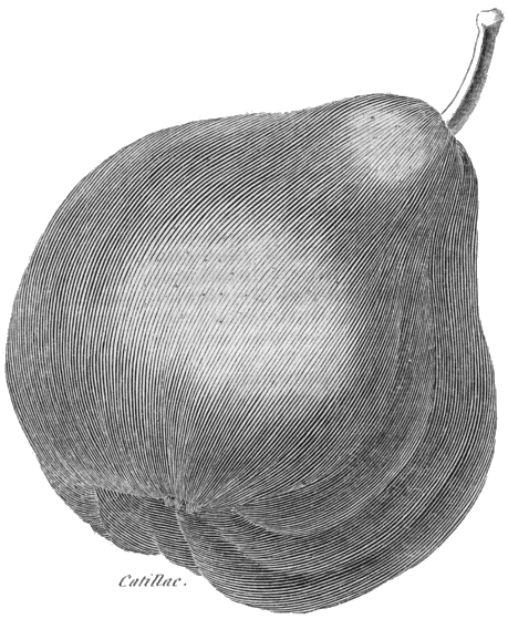 Rozier. Cours d'agriculture, tome 8, planche 18, catillac (poire)